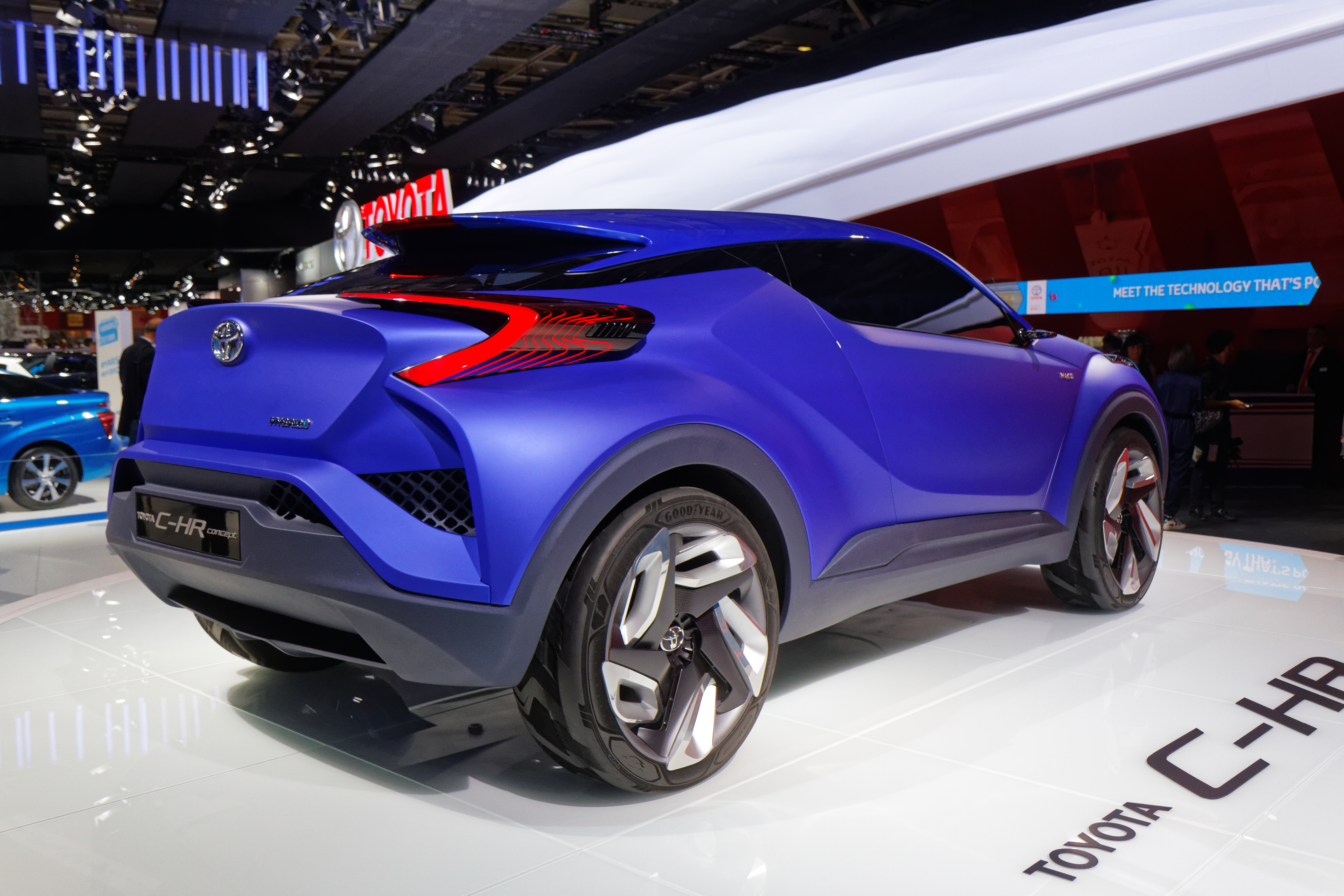 Une Toyota C-HR concept présentée lors du mondial de l'automobile de Paris 2014.